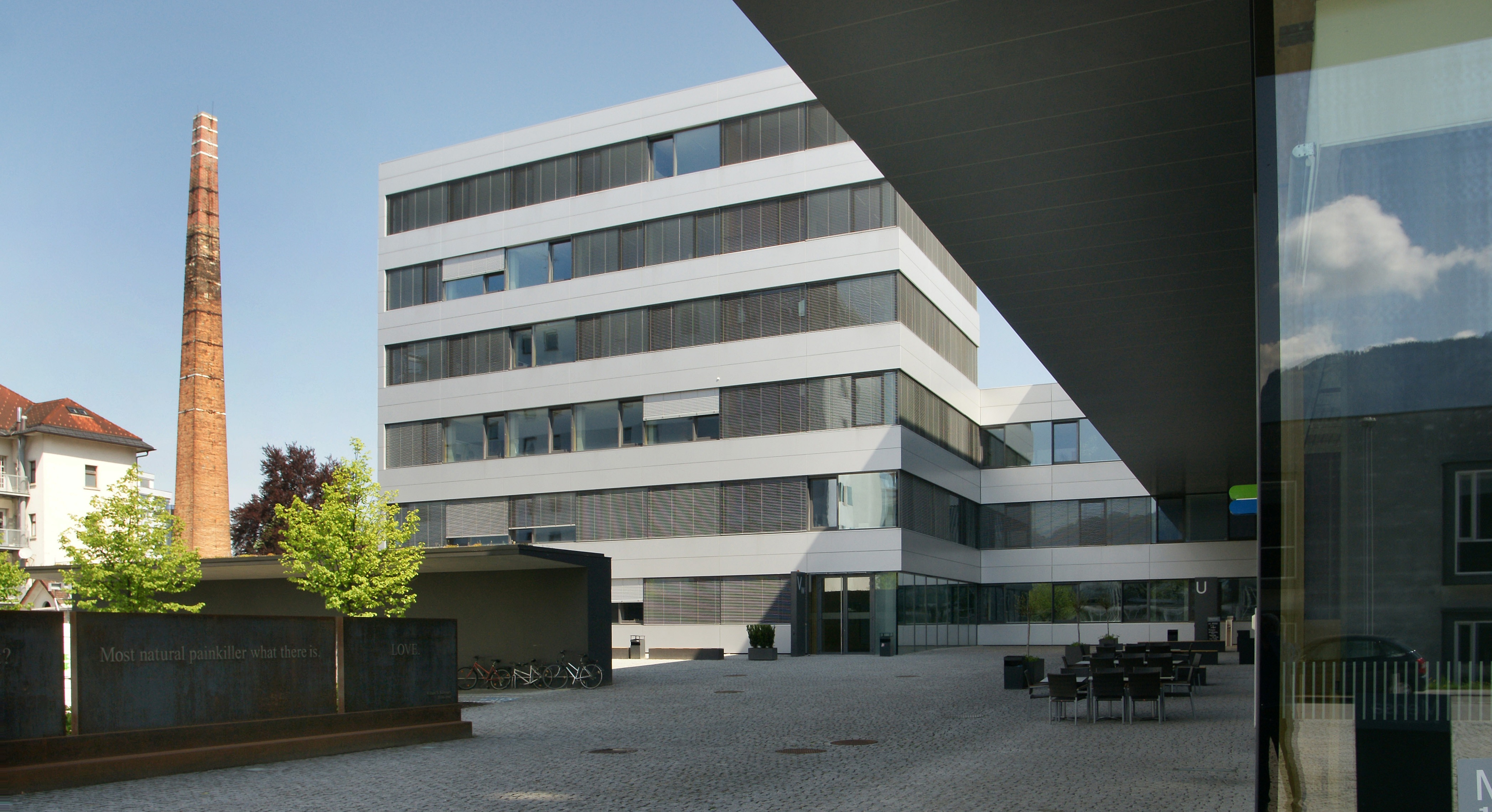 Fachhochschule FH Vorarlberg im Dornbirner Bezirk Markt. 2005 erbaut von walser + werle architekten zt gmbh.